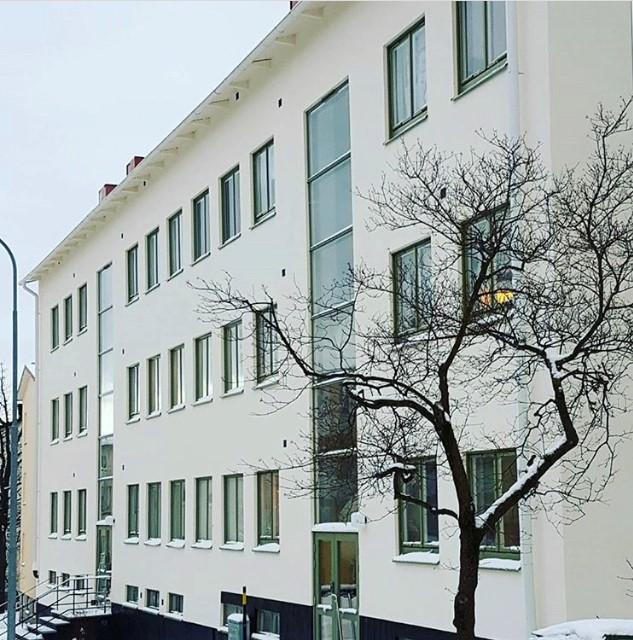 Huset på adressen Per Lindeströms väg 88-90 efter fasadrenovering vintern 2017.